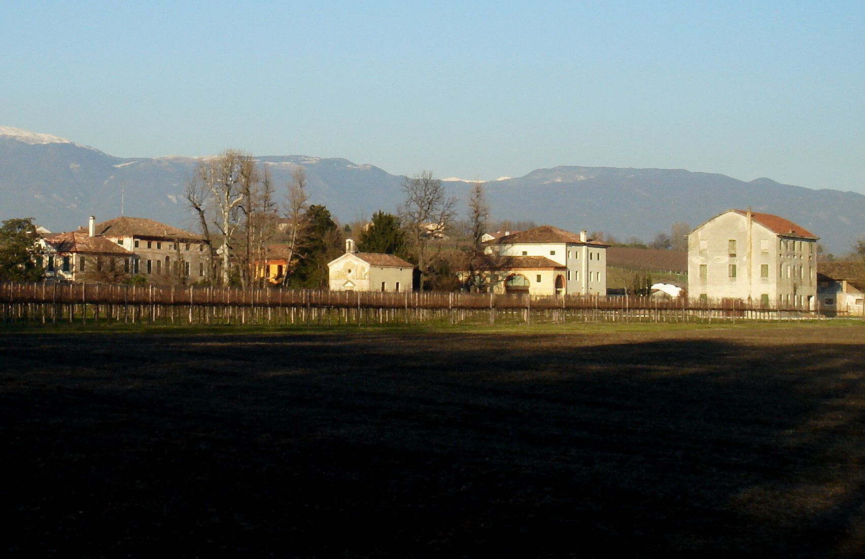 Castello Roganzuolo (San Fior, Treviso, Italia): complesso della villa padronale di via Moranda.